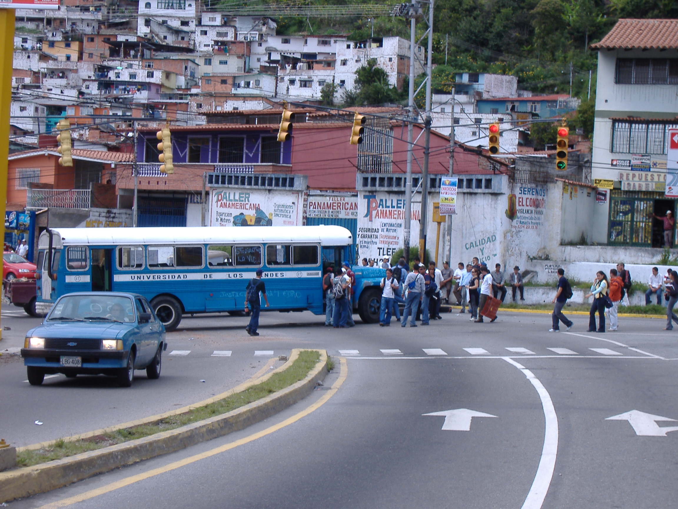 Protesta estudiantil en Mérida (Venezuela) en la cual se trancaron las calles del sector norte de la ciudad con la característica quema de caucho, las protestas se originaron después de la muerte de un vigilante empleado de la Universidad de Los Andes. Imagen tomada el 23/11/2005 por Jorge Paparoni. Para uso externo favor hacer referencia de la fuente y el autor de la fotografía.